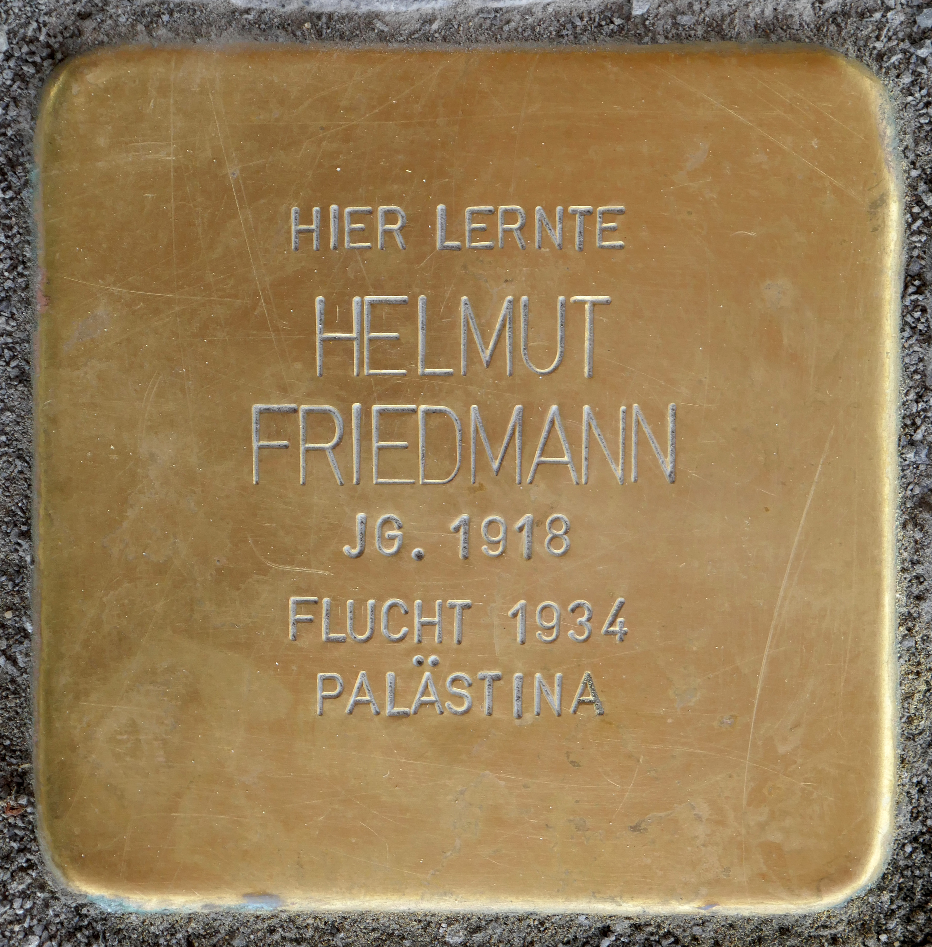 Stolperstein: Helmut Friedmann (Severinstraße 241), Köln (vor Friedrich-Wilhelm-Gymnasium).